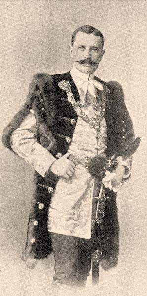 Markhot Gyula alispán